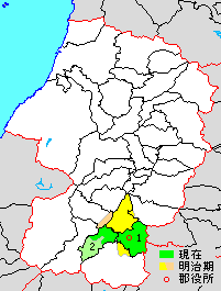 Map of Higashiokitama District, Yamagata, Japan